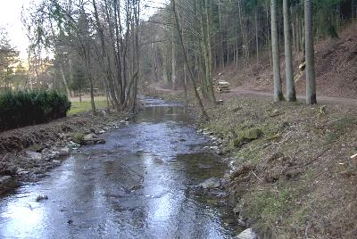 Beschreibung: Nims bei Schönecken im Februar 2004 Quelle: selbst fotografiert Fotograf: Norbert Rosskopp, Schönecken